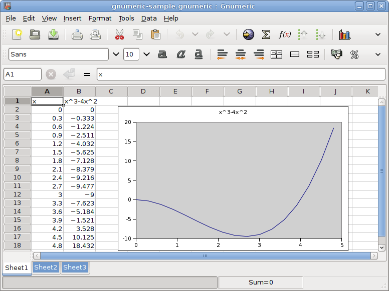 Gnumeric 1.8.1